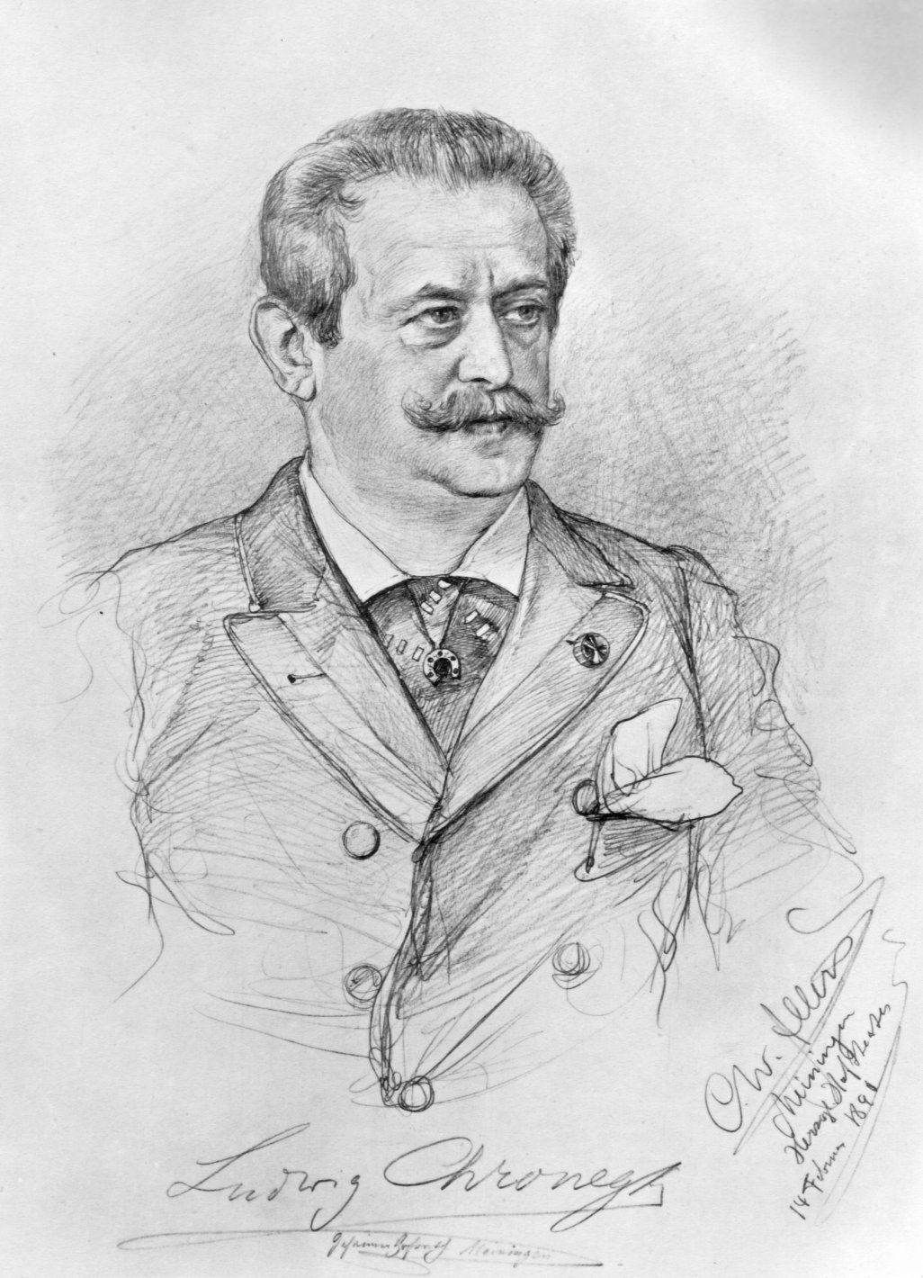 Portrait des Intendanten Ludwig Chrinegk